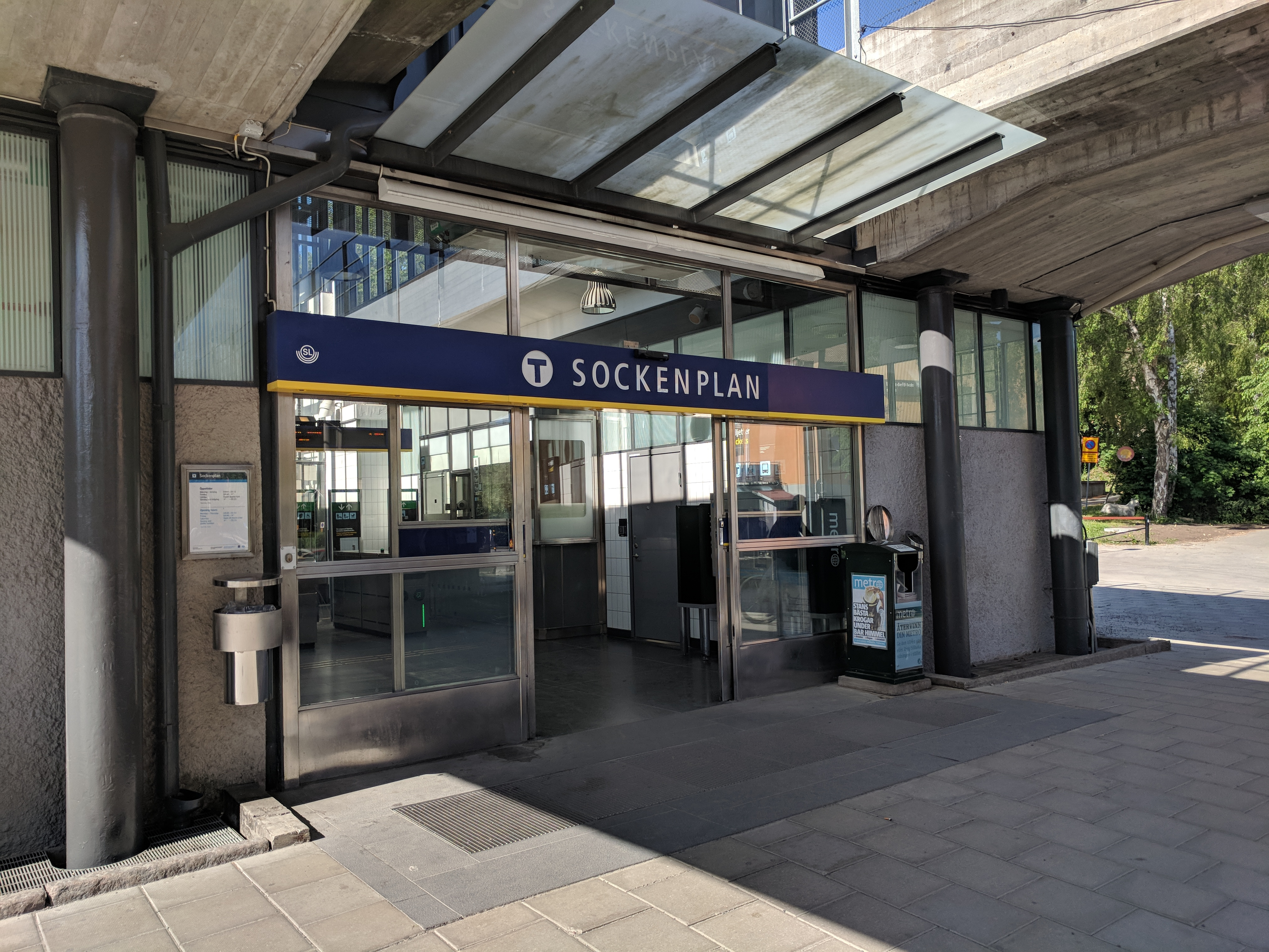 Sockenplan metro